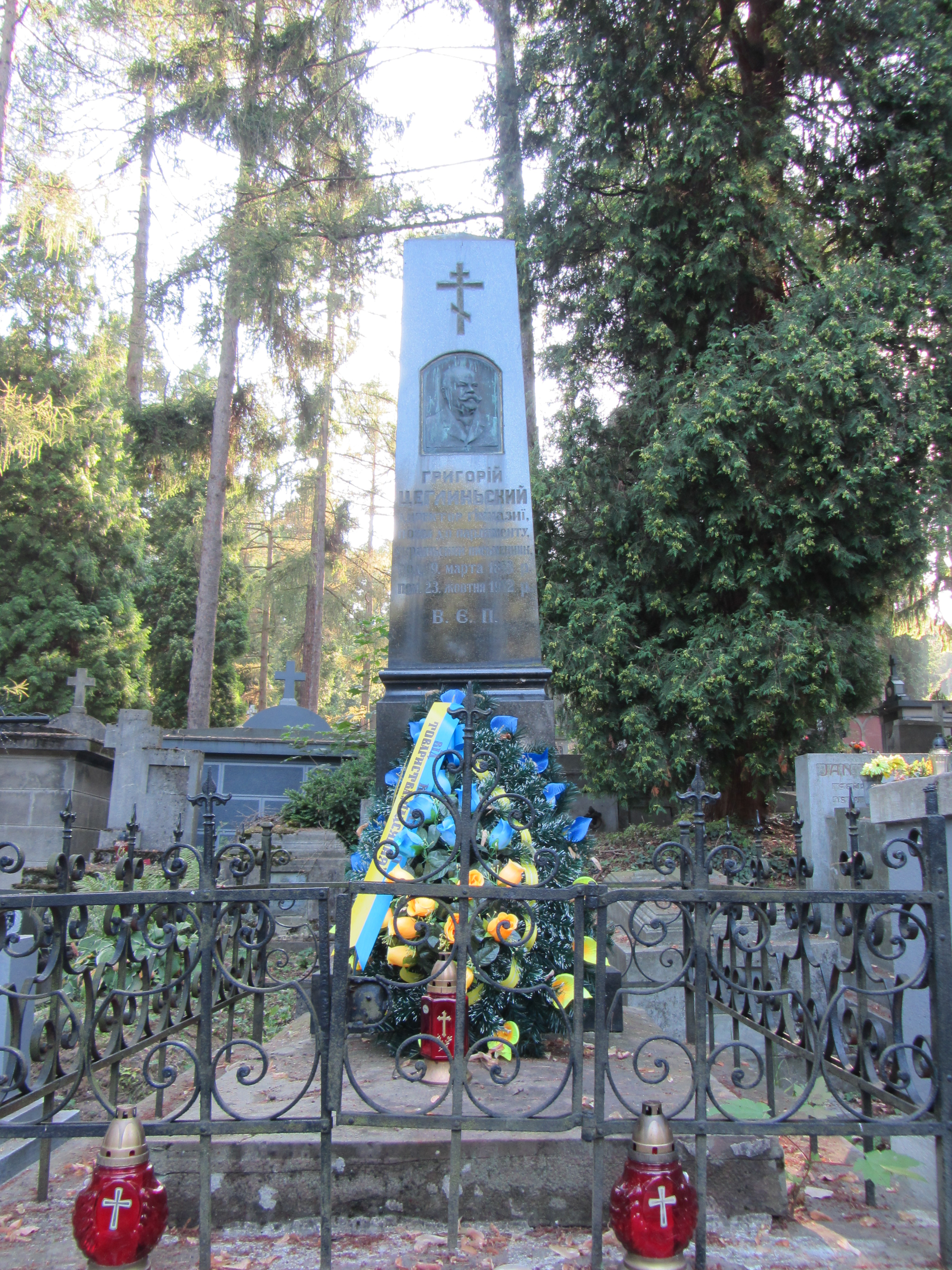 Grobowiec na Cmentarzu Głównym w Przemyślu